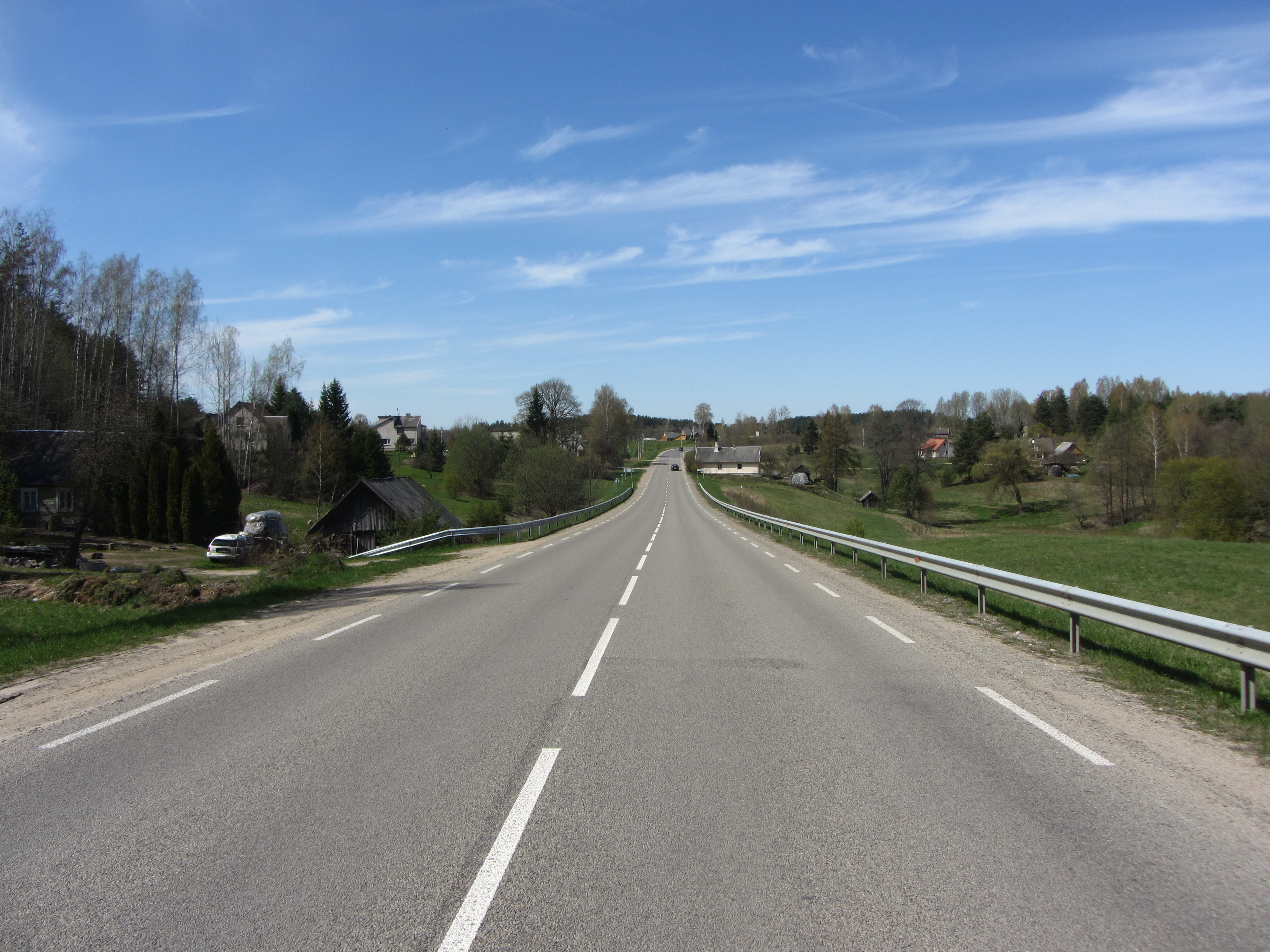 Magučiai, Lithuania